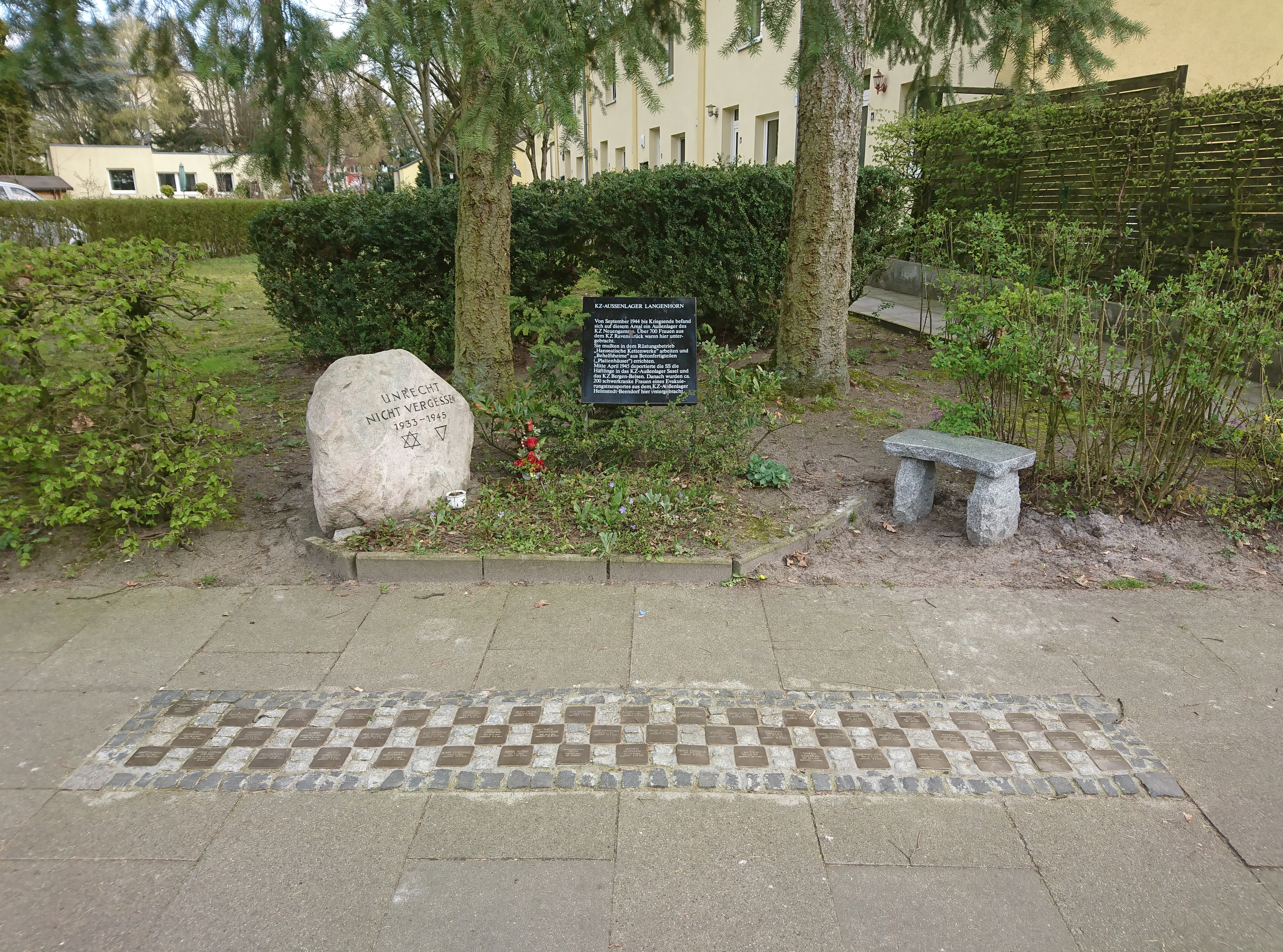 Gedenkstätte KZ-Außenlager Hamburg-Langenhorn, Essener Straße 54 mit Solpersteinen im Vordergrund und einer neuen Bank